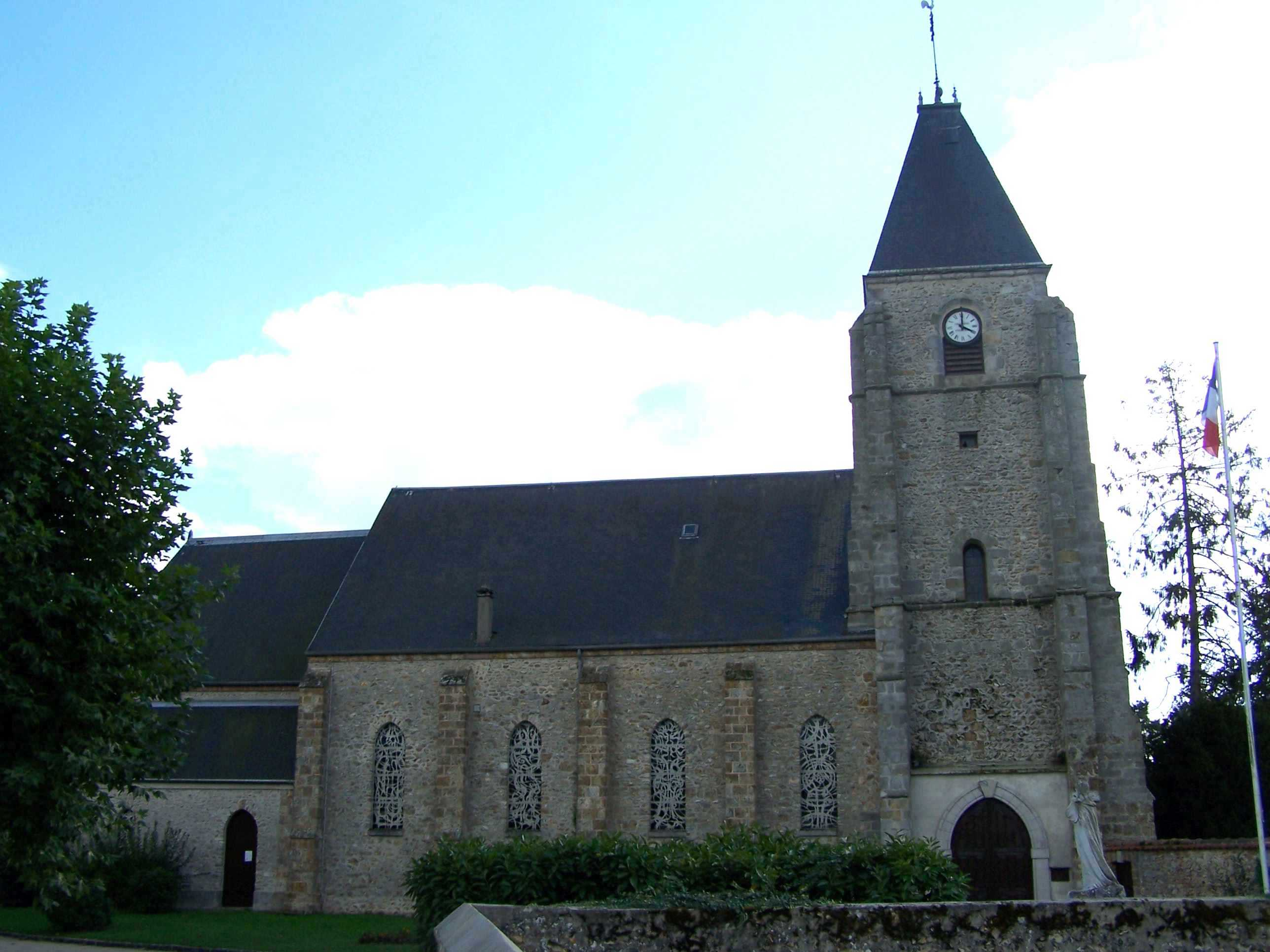 Église de Bonnelles (Yvelines, France)